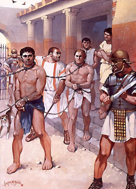 Orjad